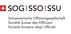 Logo der Schweizerischen Offiziersgesellschaft